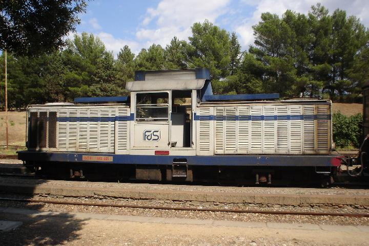 Dieselelektrische Lokomotive (LDe 600) der Ferrovie della Sardegna (FdS) in Mandas vor einem Touristenzug nach Arbatax, Anfang September 2008.